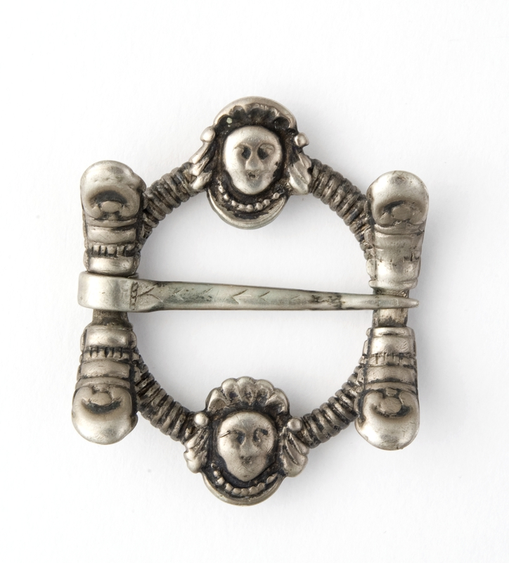 Halsring eller glibbring i sølv fra Bykle i Setesdal, Aust-Agder. Foto Anne-Lise Reinsfelt/Norsk Folkemuseum. NF.18797-0570.